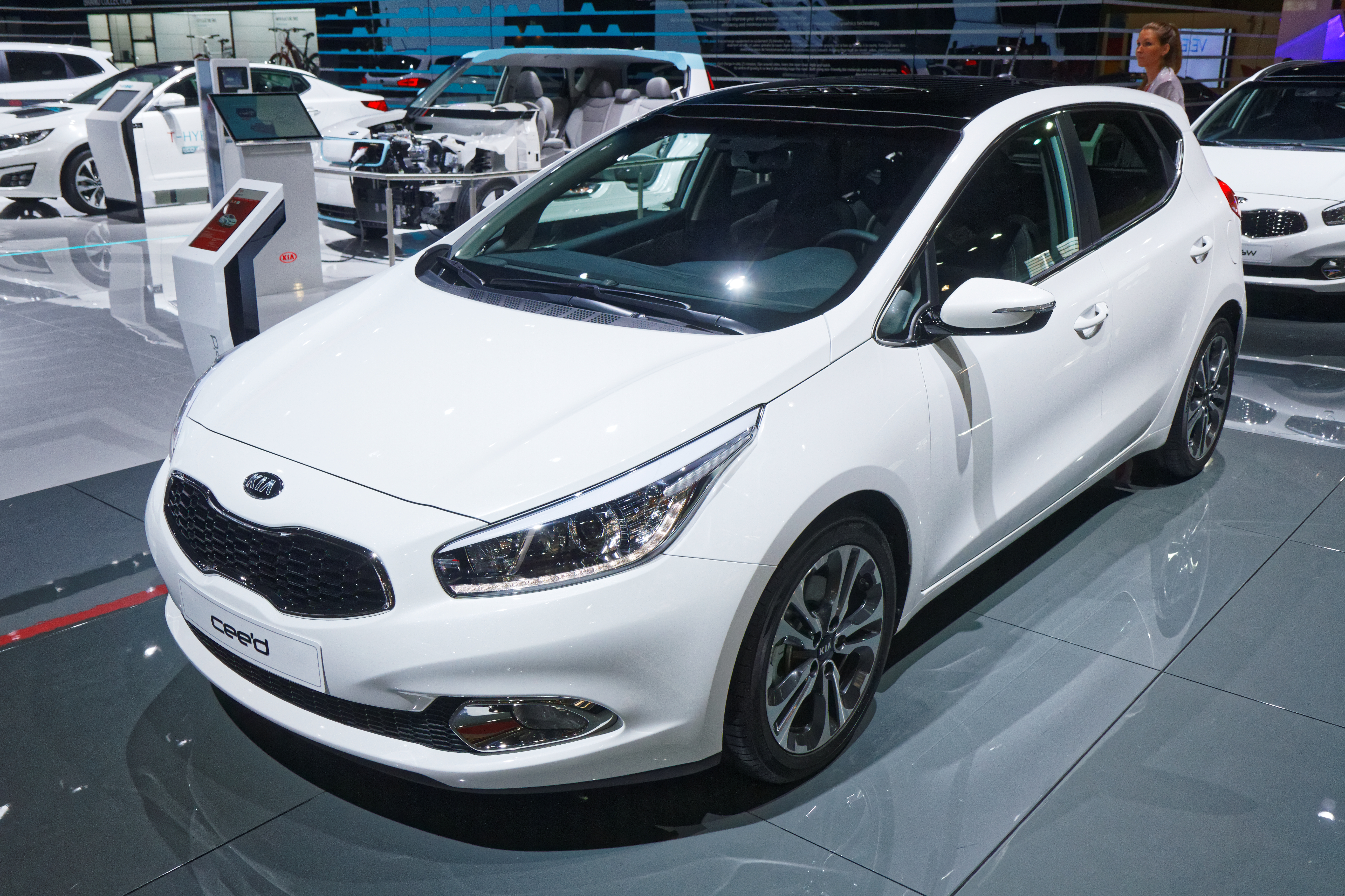 Une Kia Cee'd présentée lors du mondial de l'automobile de Paris 2014.